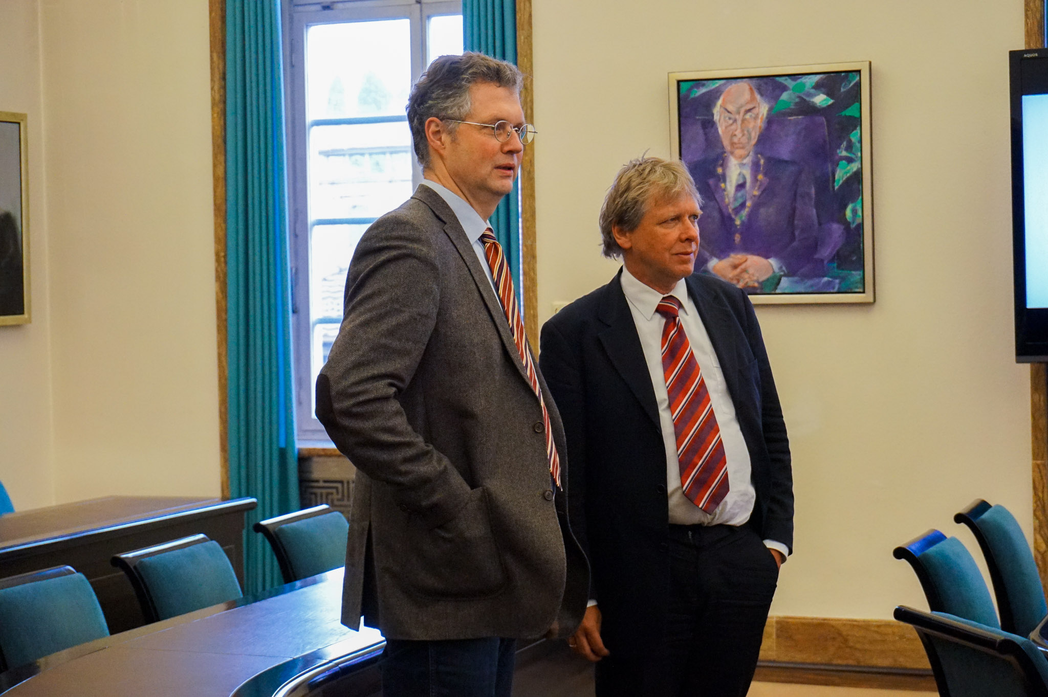 პროფ. შრამი და პროფ. ჰაინრიხი თუბინგენში, 2018 წ.